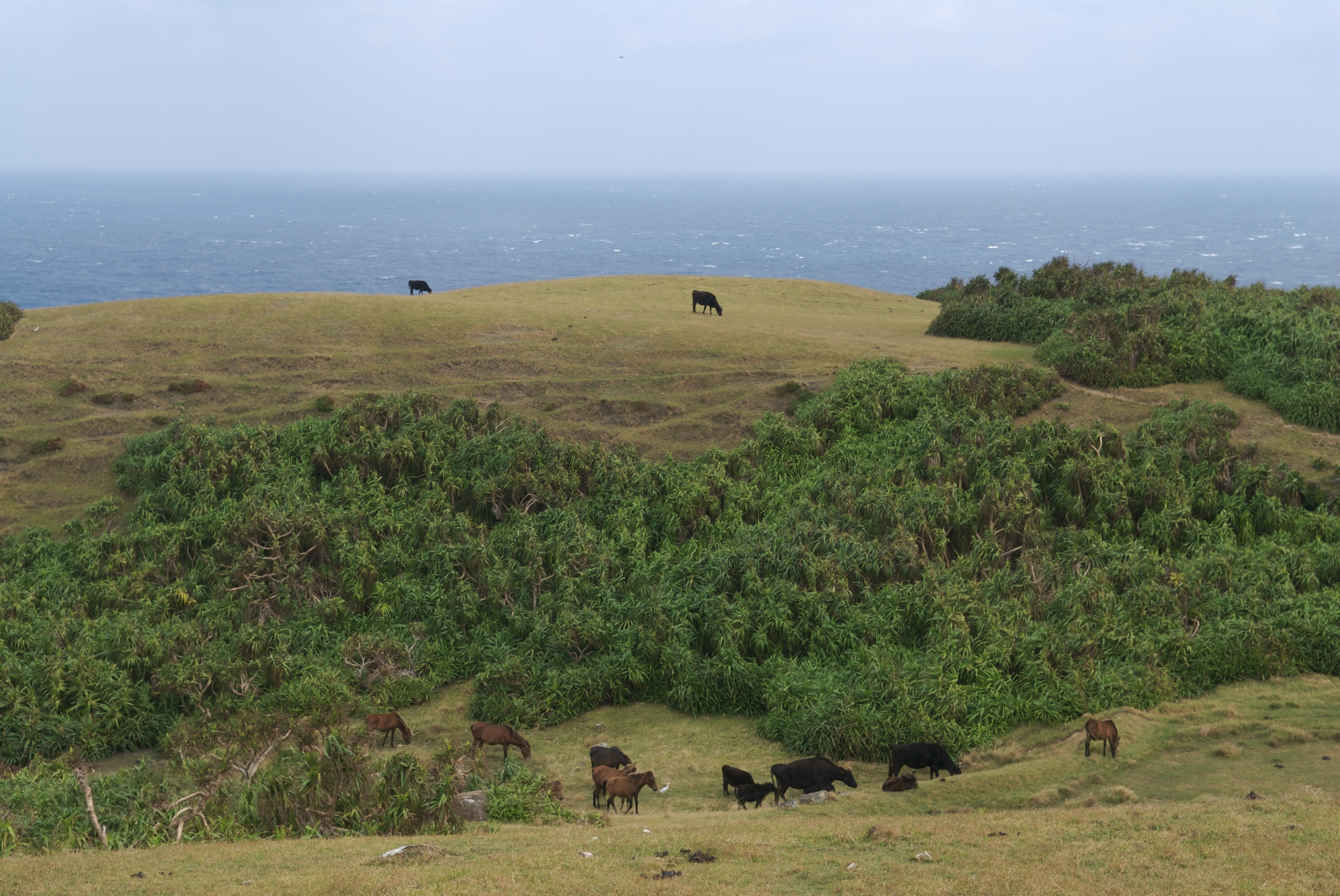 @Yonaguni Island